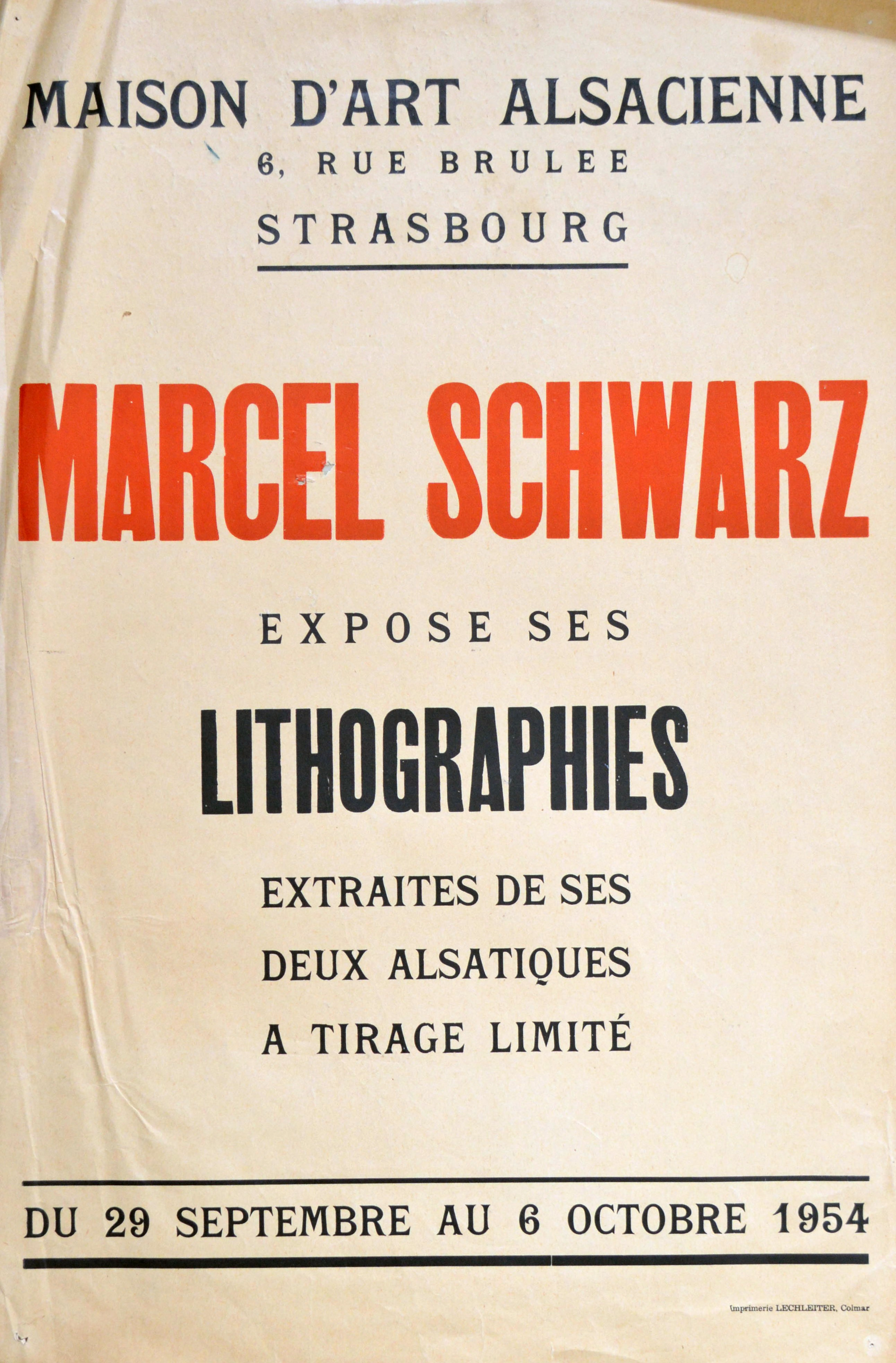 affiche